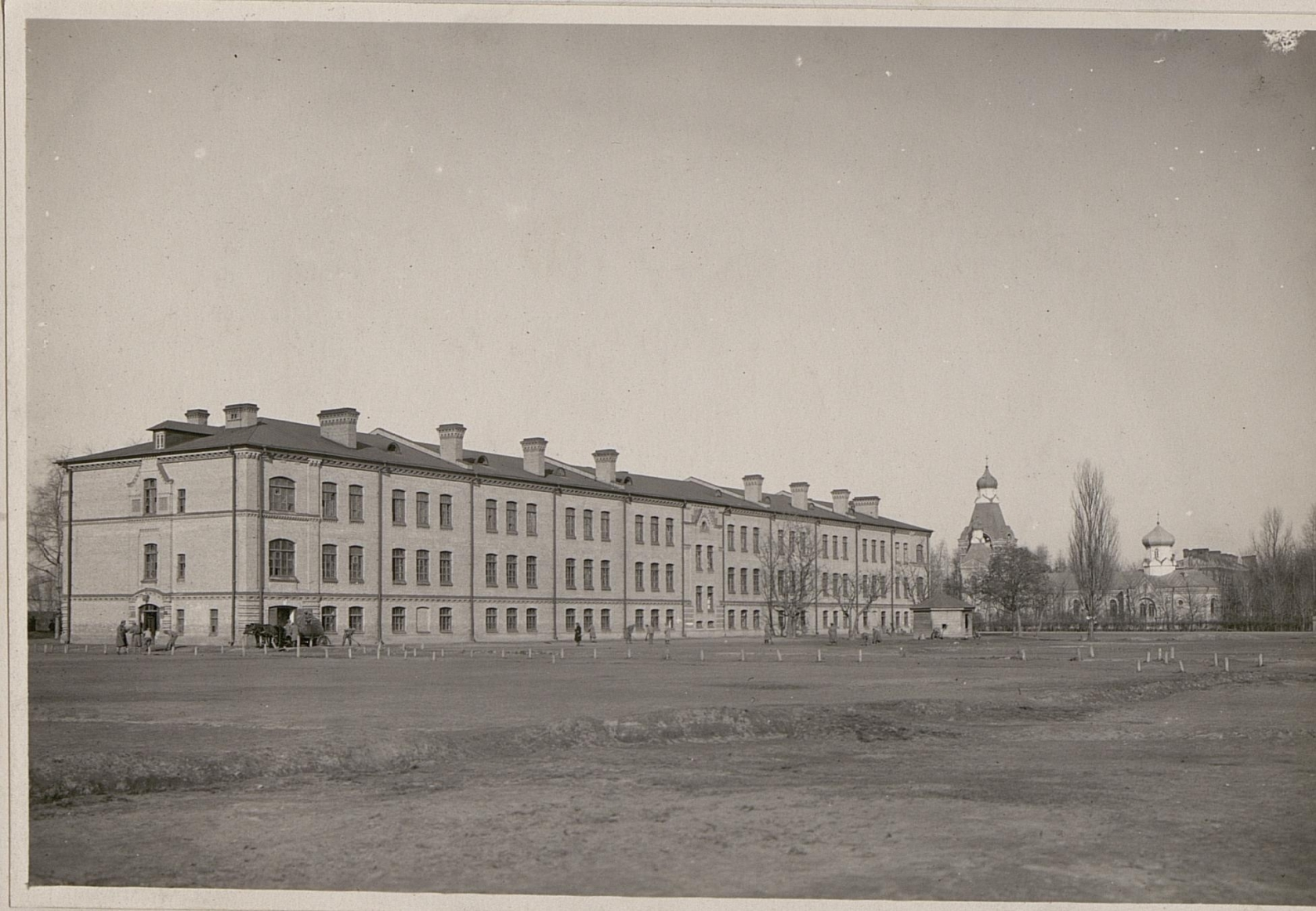 Kaserne in Luck mit der russischen Garnisonskirche.